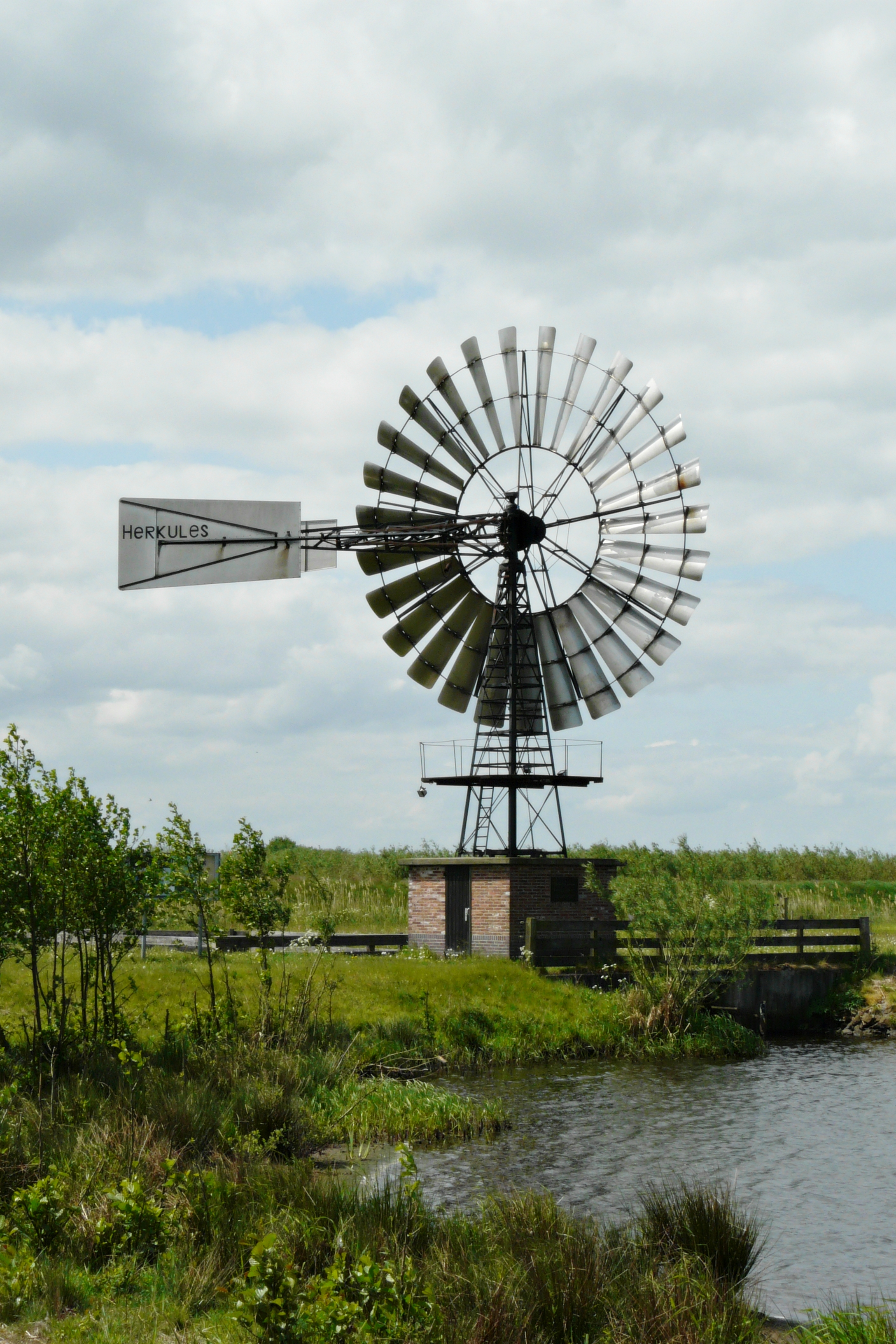 De Herkules windmolen in het natuurgebied Leinwijk nabij Kropswolde, Groningen.